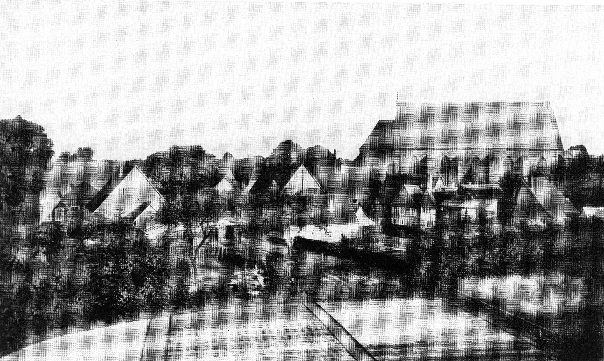 Ansicht der St. Lucia-Kirche in Harsewinkel vom Neubau des Krankenhauses